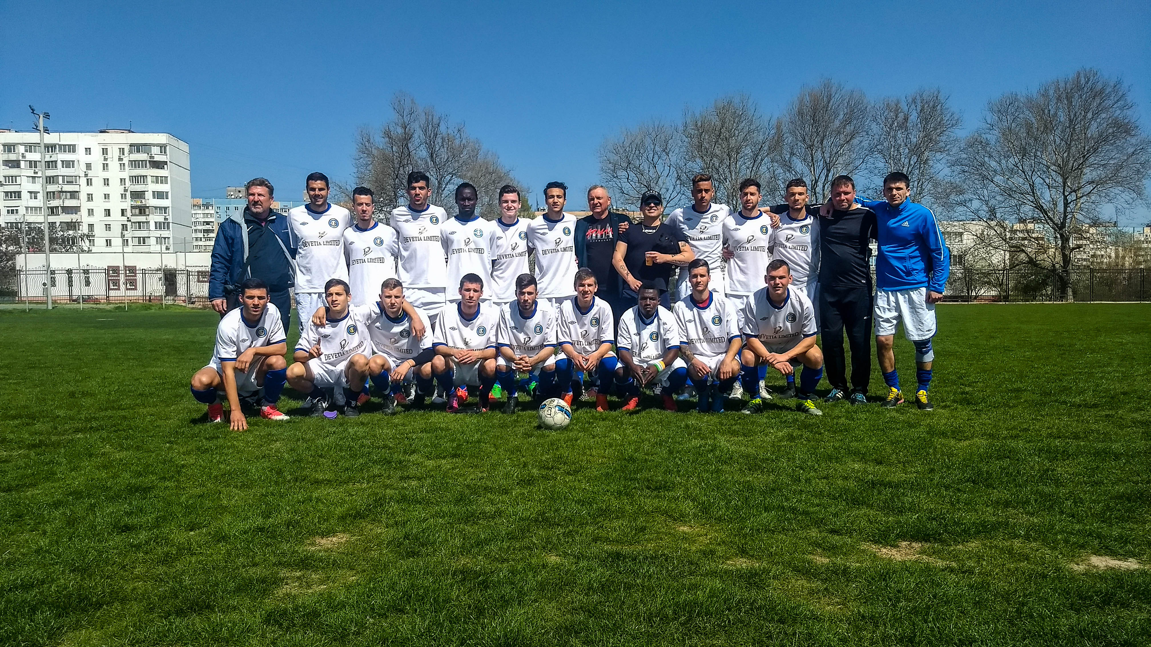 Inter Odessa Football Club Team